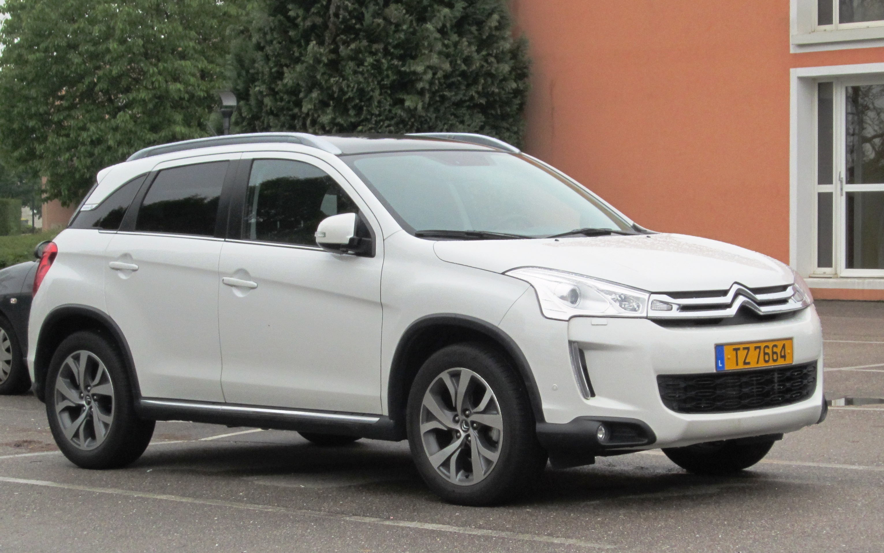 Citroën C4 Aircross qui visite Epinal-88